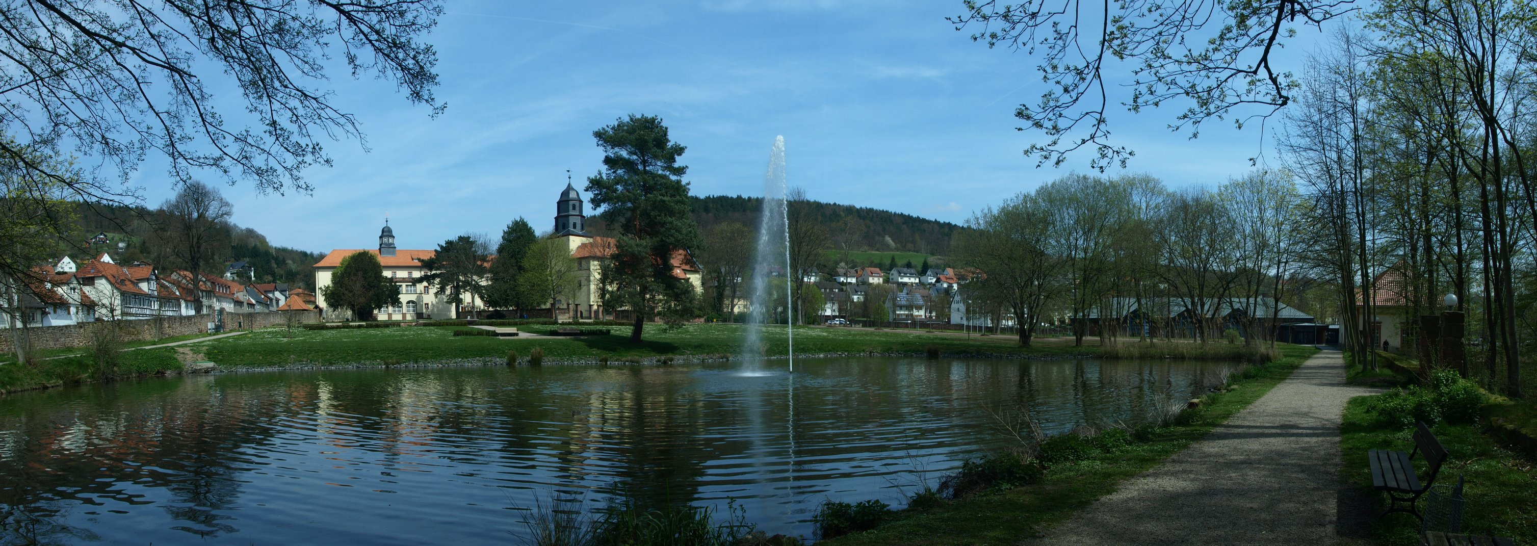 Panorama der Schlossanlage von Süden her, mit dem Schlossgarten